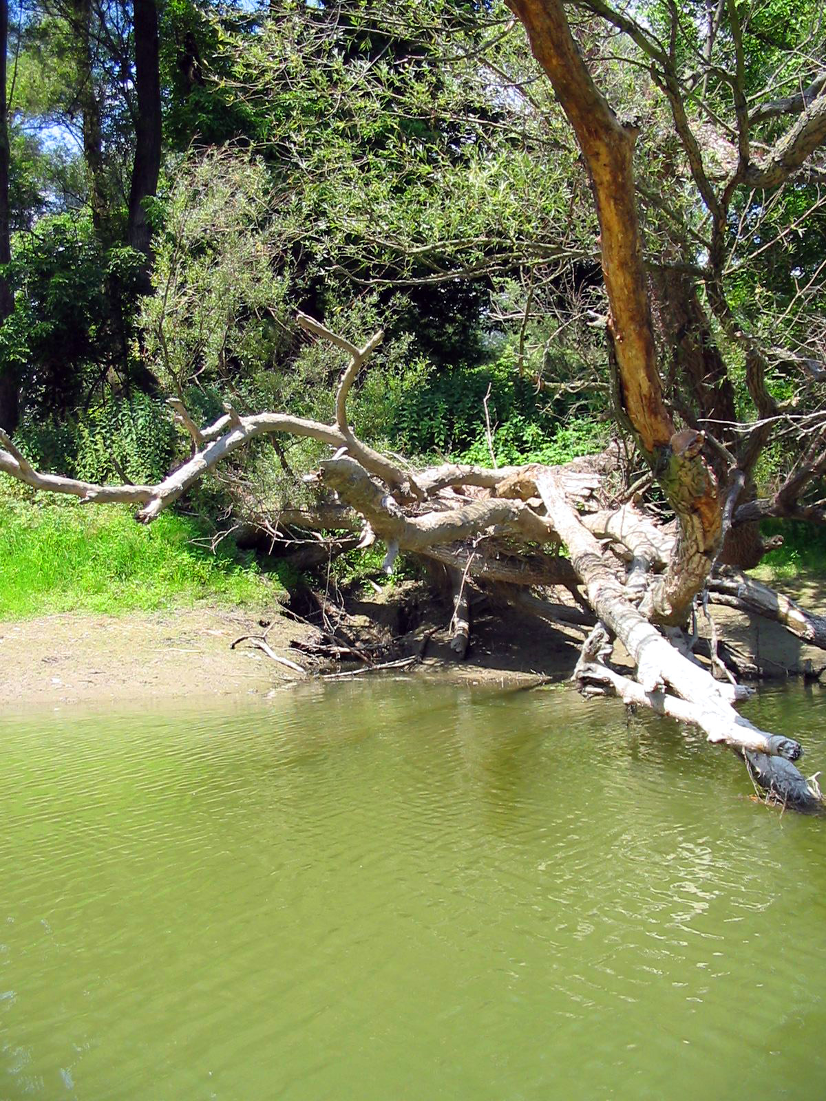 Biberbau (Nachbearbeitung von [1])